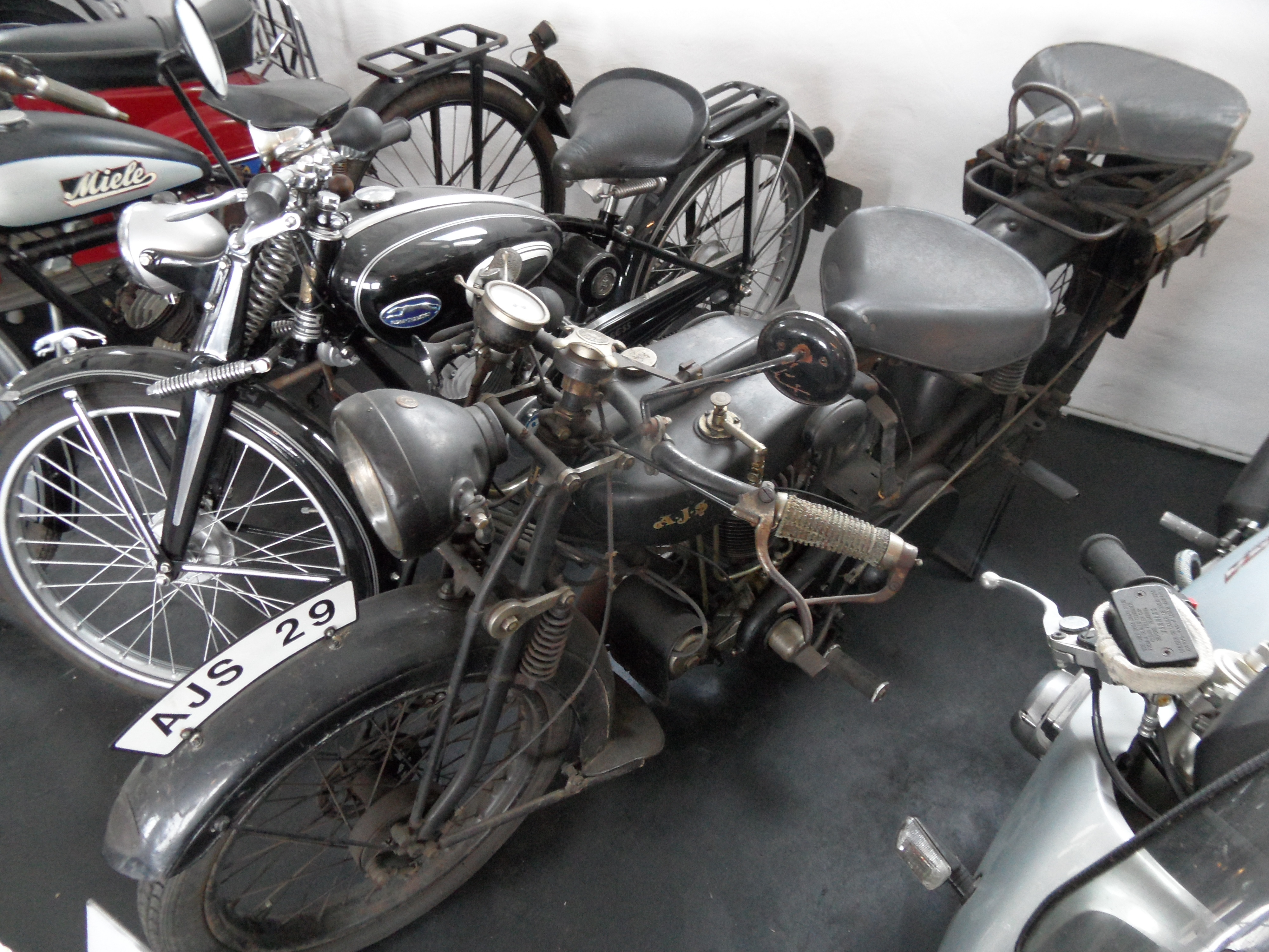 Motocykl AJS 500 cm3 z 1929 r. w muzeum motoryzacji w Melle. Oryginalny stan zachowania.